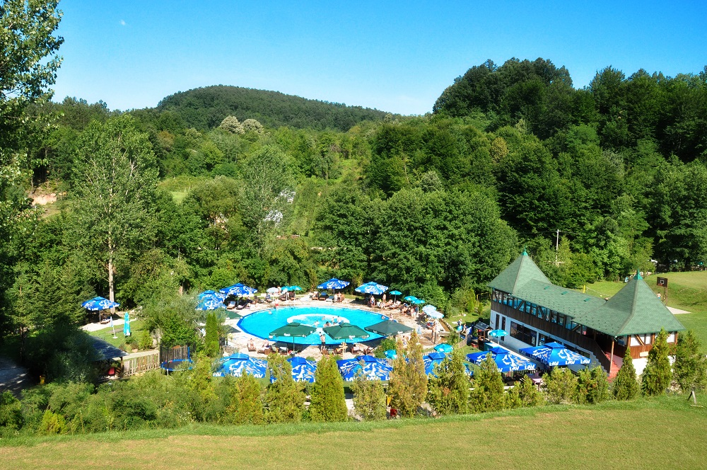 Srpskohrvatski / српскохрватски: Klub Budimlija